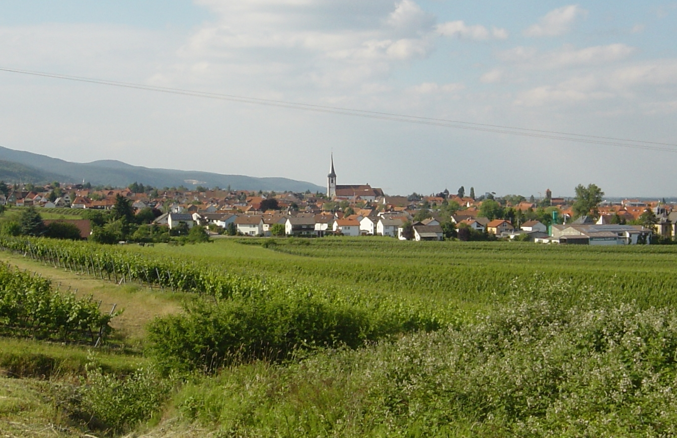 Der Ort Maikammer